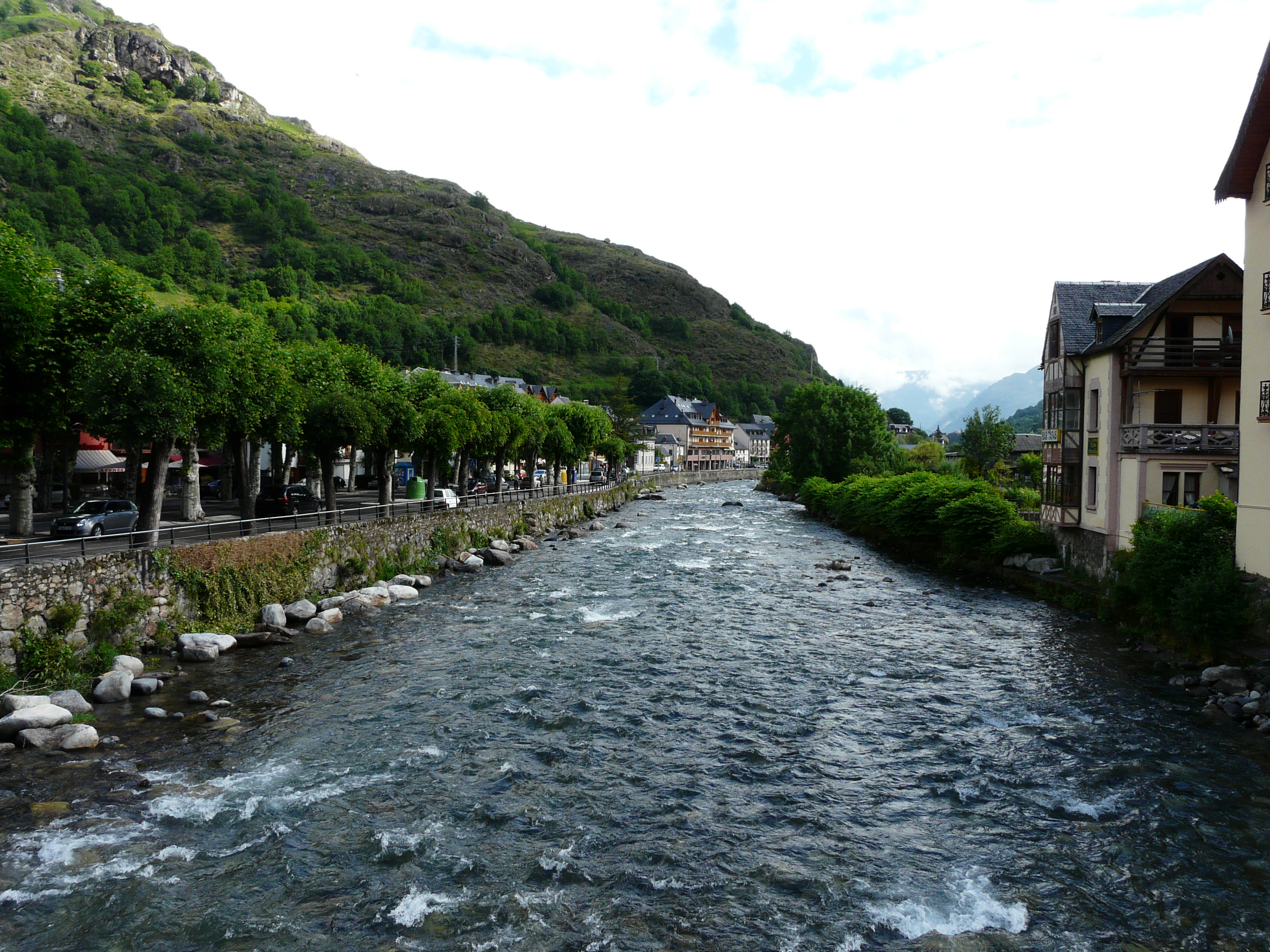 La Garonne en aval du pont dans le village de Bossòst, Val d'Aran, Catalogne, Espagne.